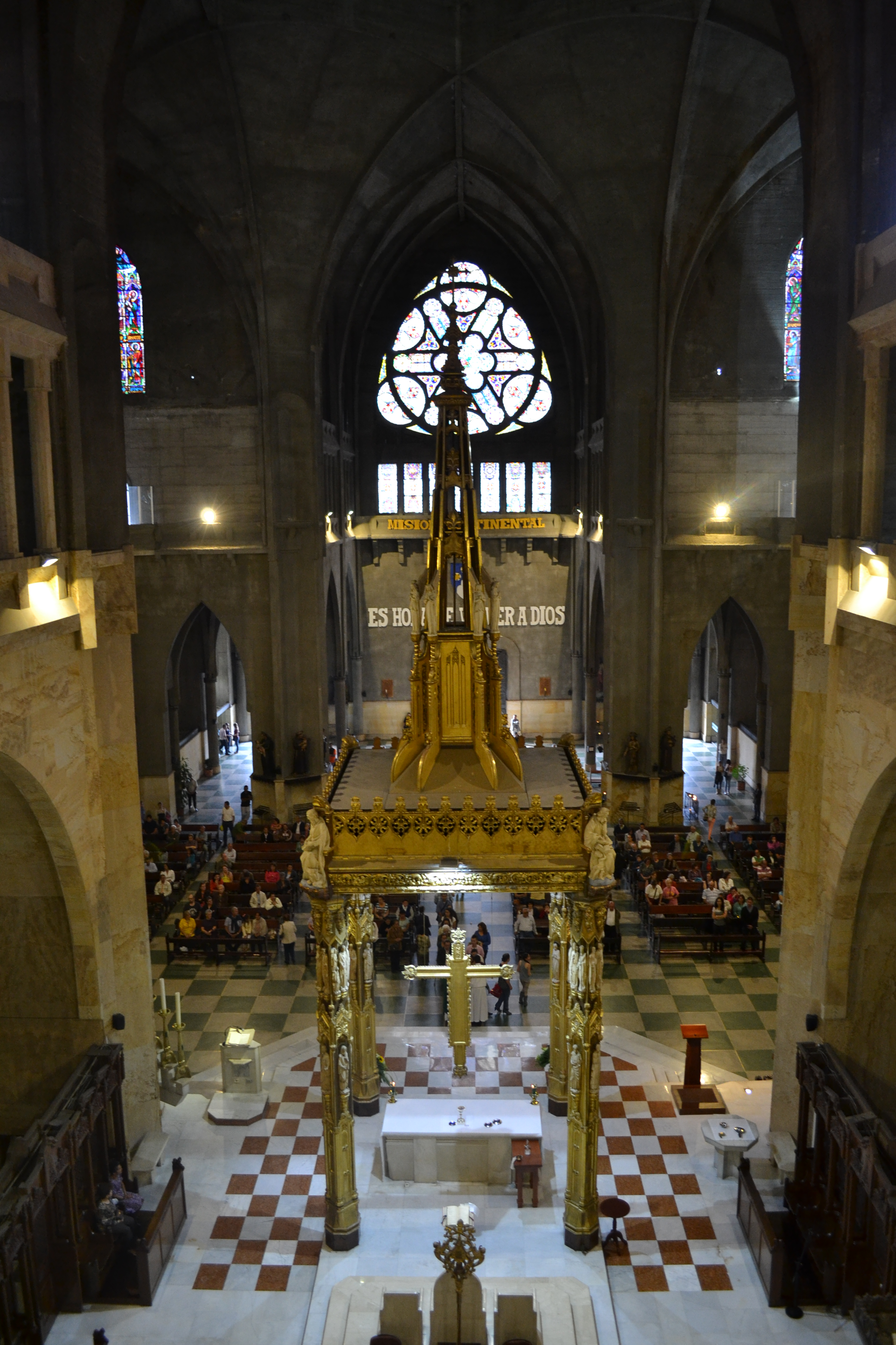 Celebración Eucarística de la Catedral